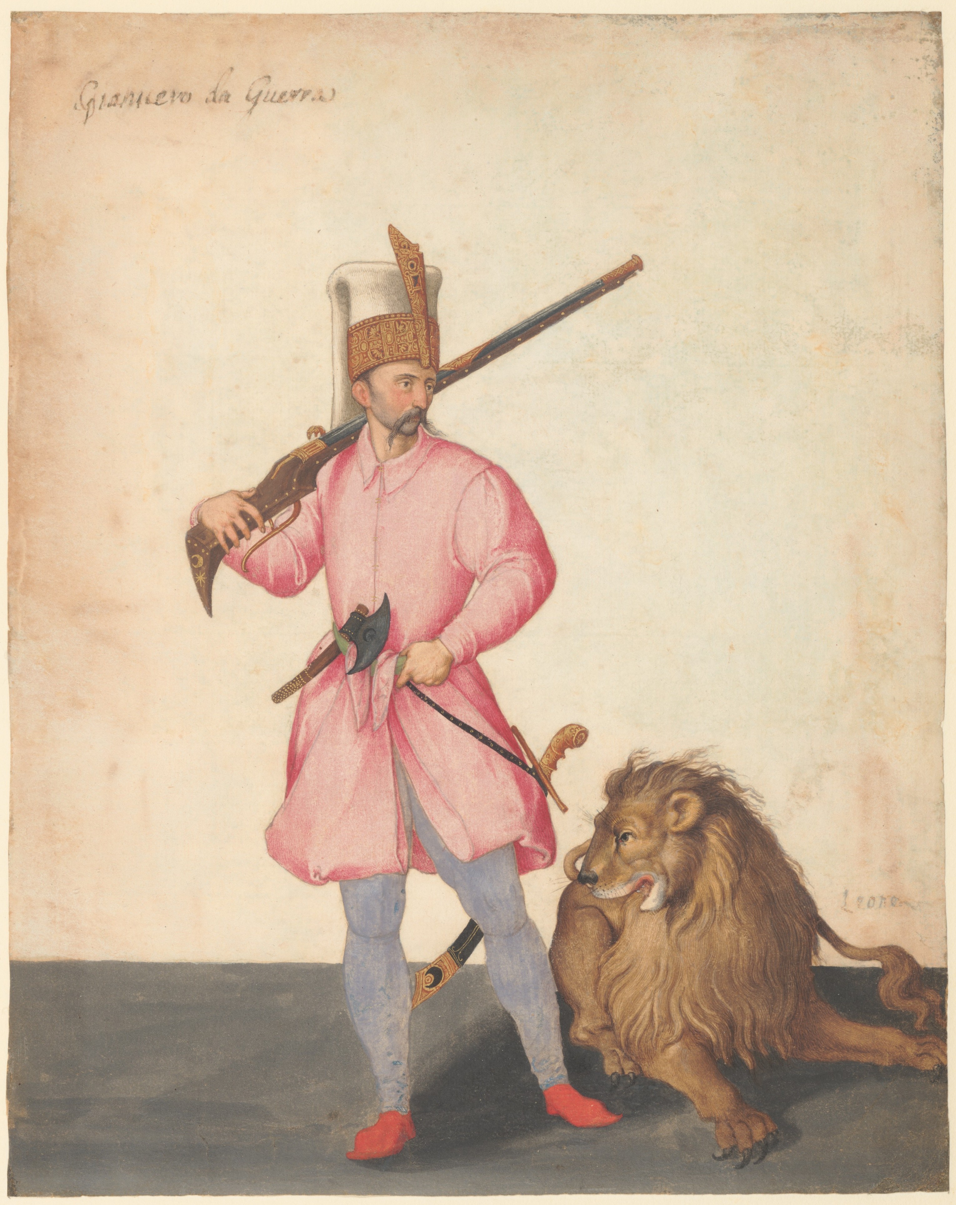 Drawing; Drawings